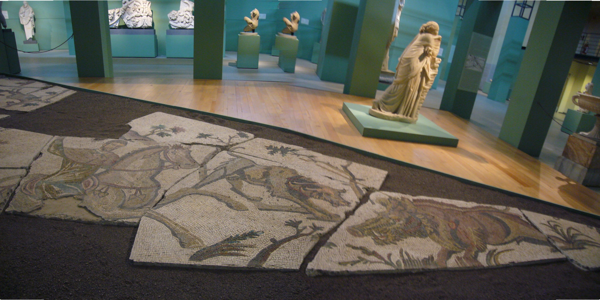 Centrale Montemartini a Roma: parte del mosaico della caccia (IV sec.) rinvenuto nel 1904 presso Santa Bibiana, agli Horti Liciniani